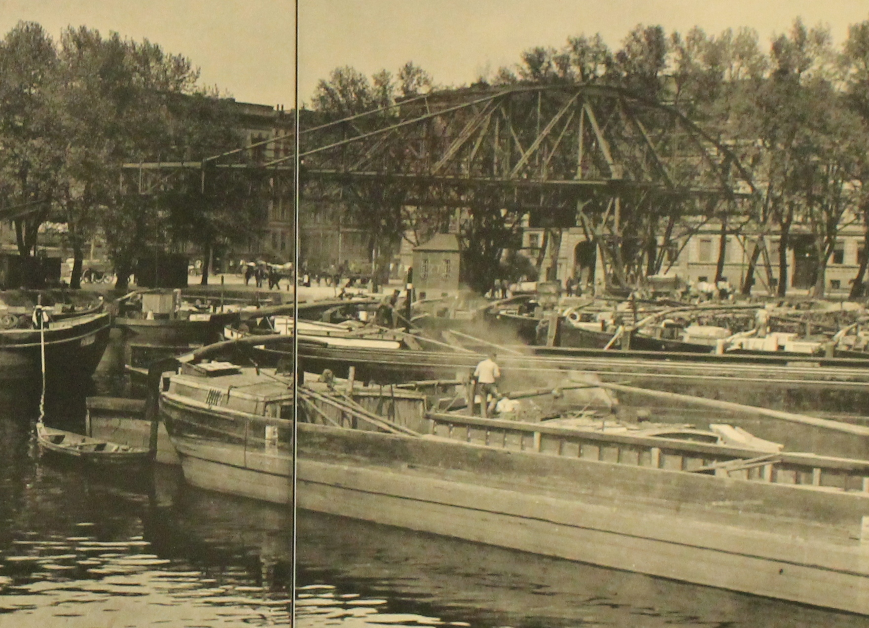 Berliner Palettenkran am Hafenplatz um 1910